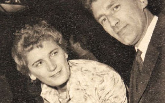 Iolanda Balaș with husband